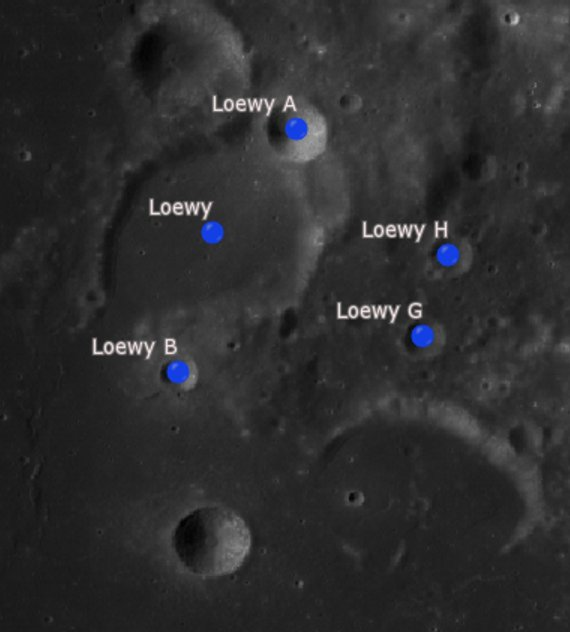 Cráter lunar Loewy. Cráteres satélite. (Imagen LRO)